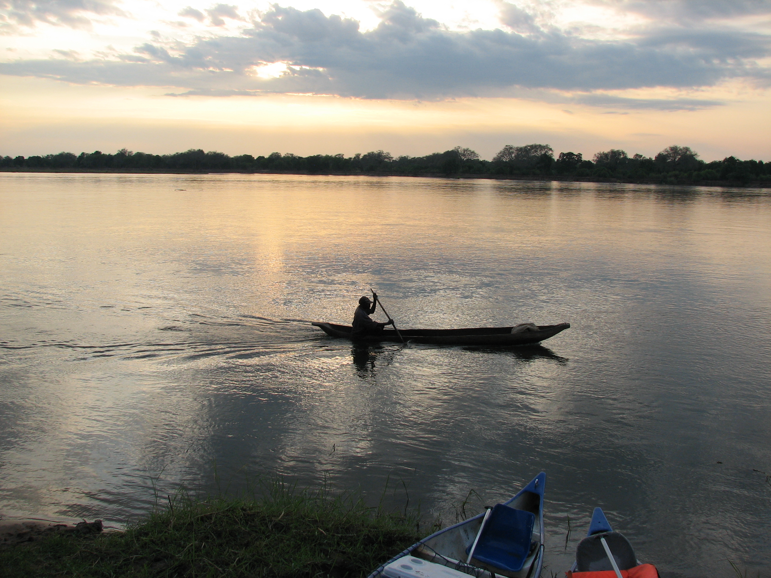 דייגים על הזמבזי This is an image of food from Zambia